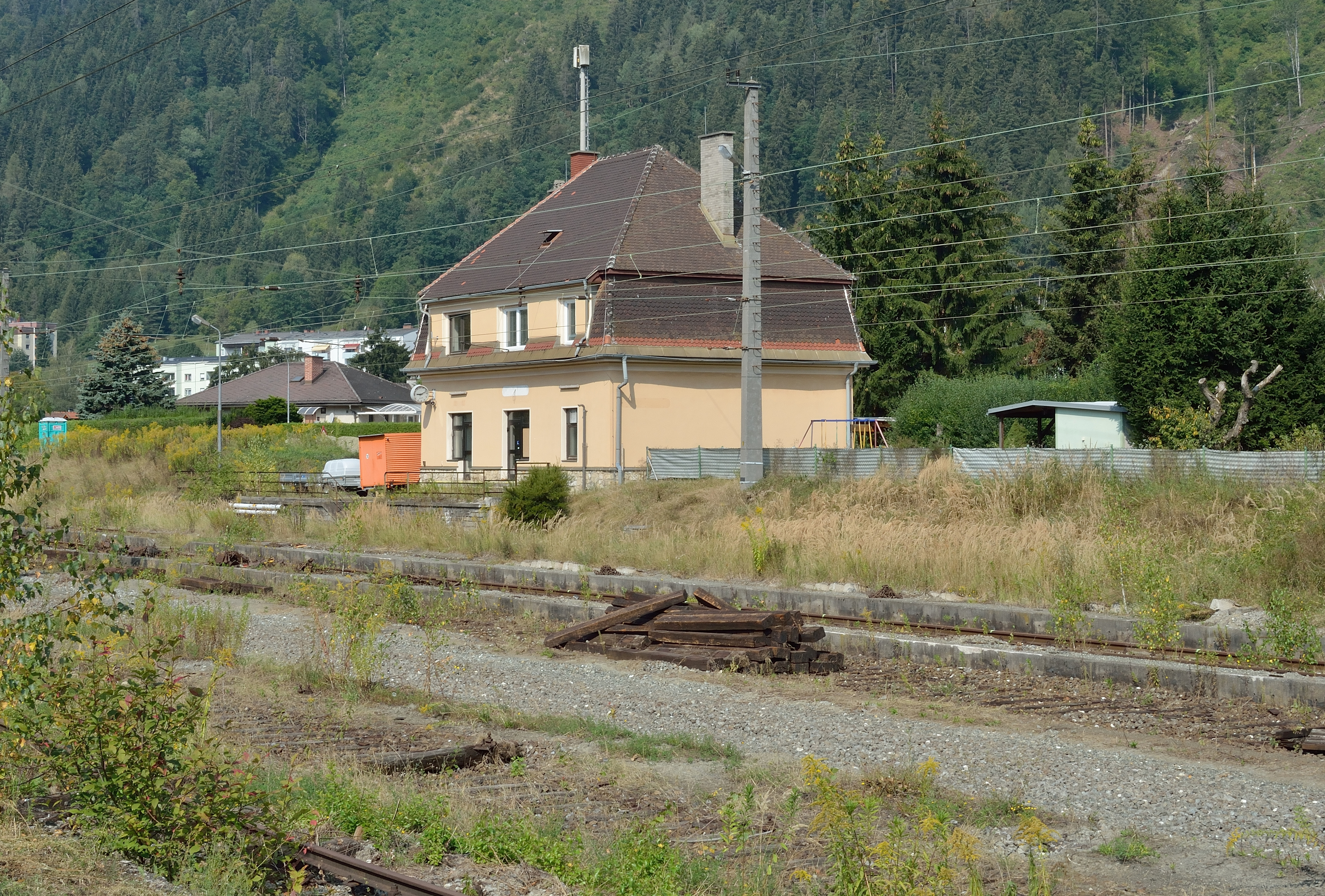 Der ehemalige Bahnhof Leoben Hinterberg mit bereits teilweise erfolgten Gleisabbauten.